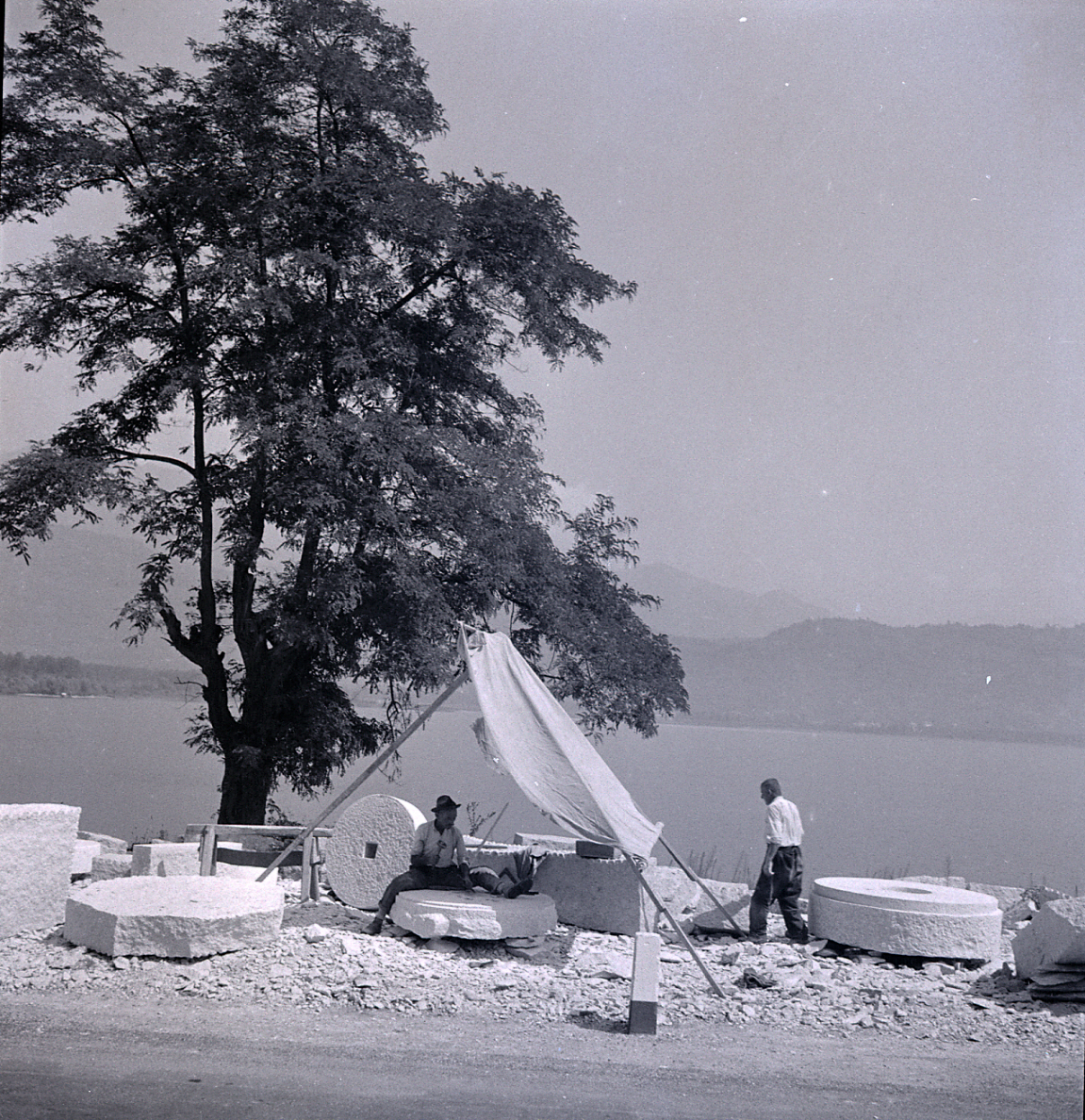 Serie fotografica : Baveno, 1980 / Paolo Monti. - Buste: 2, Fototipi: 2 : Negativo b/n, gelatina bromuro d'argento/ pellicola ; 6x6. - ((Serie costituita da 2 negativi identificati con la numerazione: 3540-3541. Sulla busta R3540 manoscritto: "MScalpellini di /Feriolo". La suddetta serie è contenuta nella scatola identificata con la numerazione R3499/3788. Sul coperchio iscrizione manoscritta a pennarello: "1 Località varie".